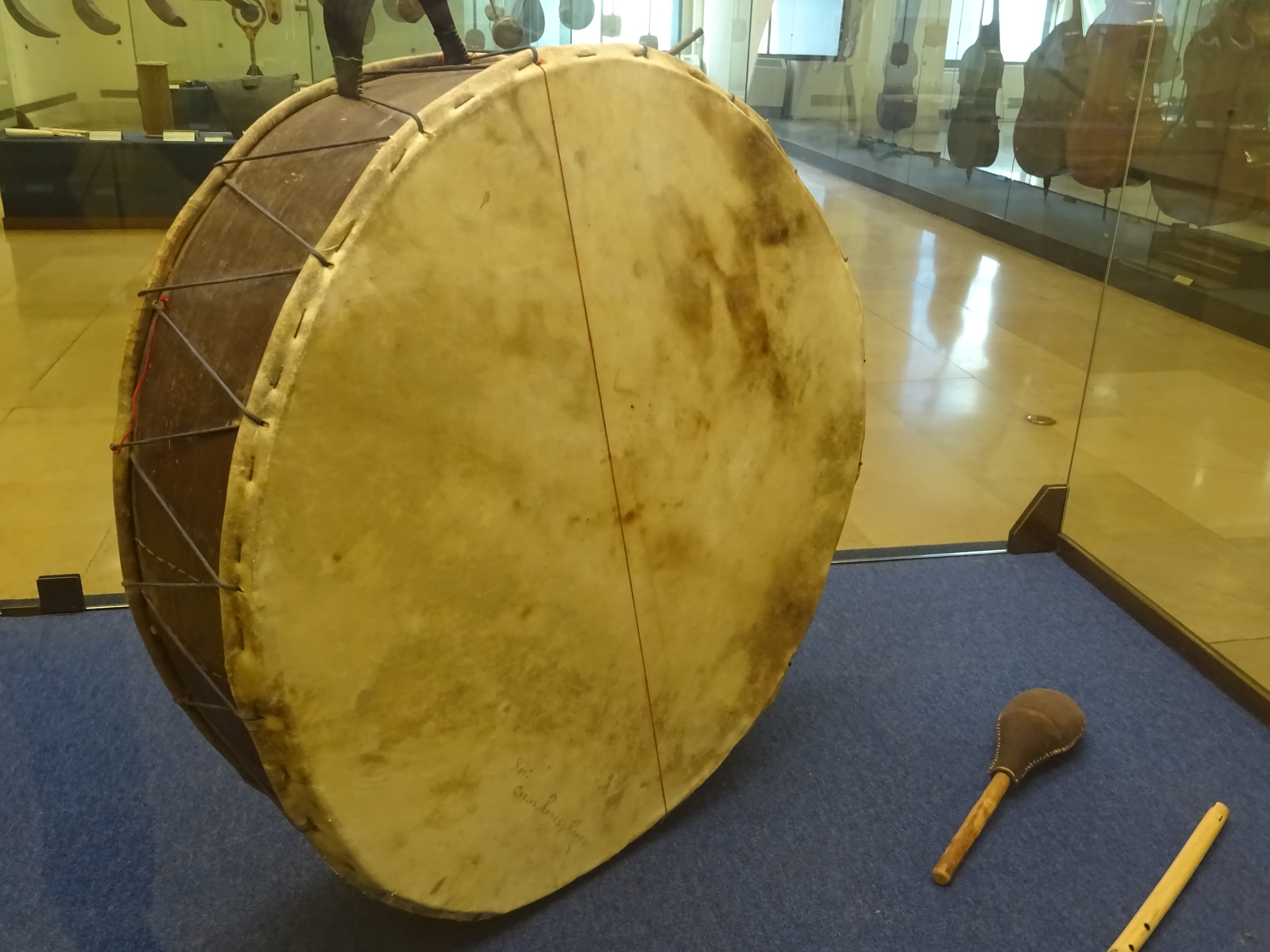 Cava péruvienne, au musée des instruments de musiques de Milan